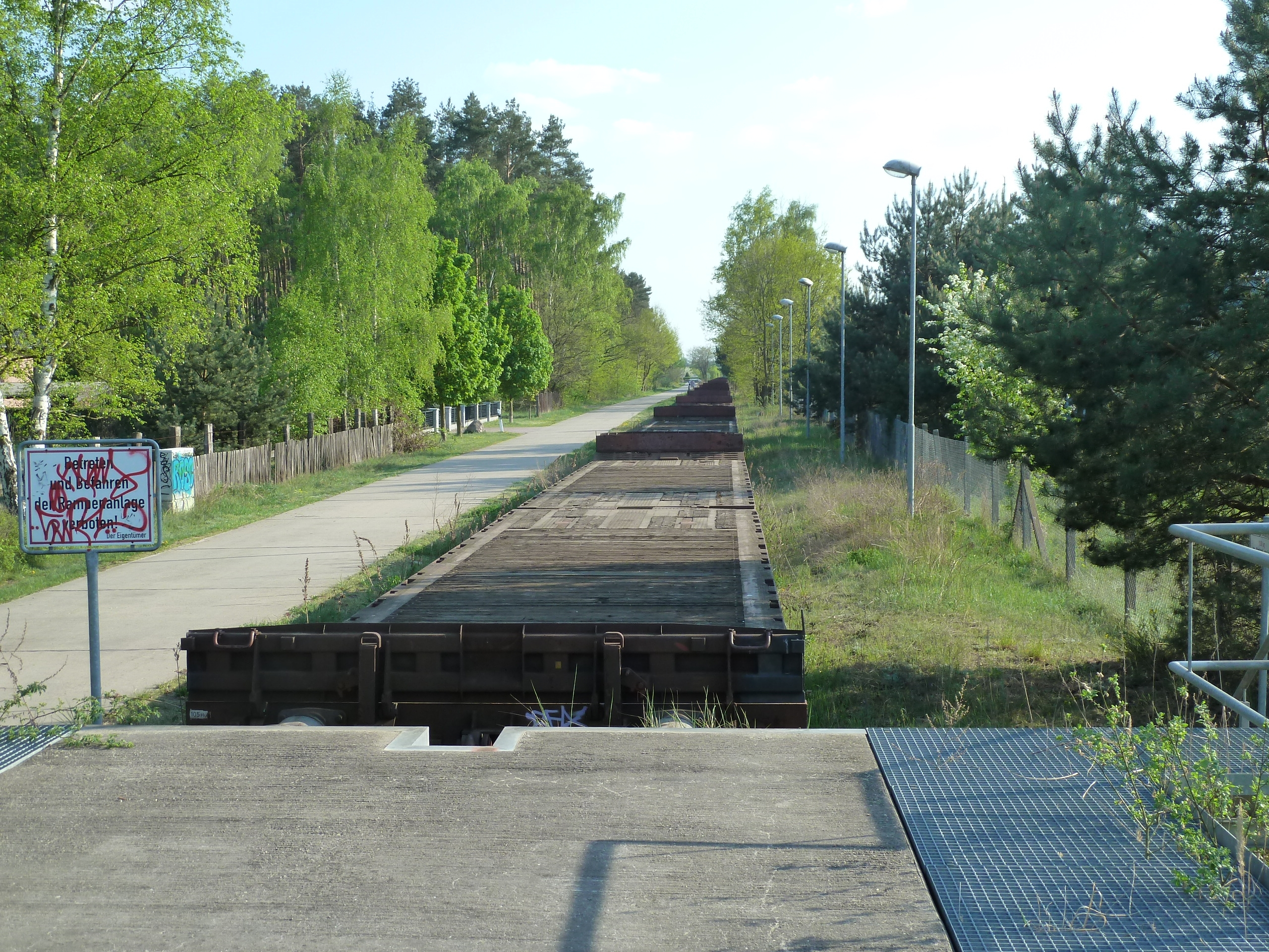 Streckenende der Westhavelländischen Kreisbahn in Brielow bei Brandenburg